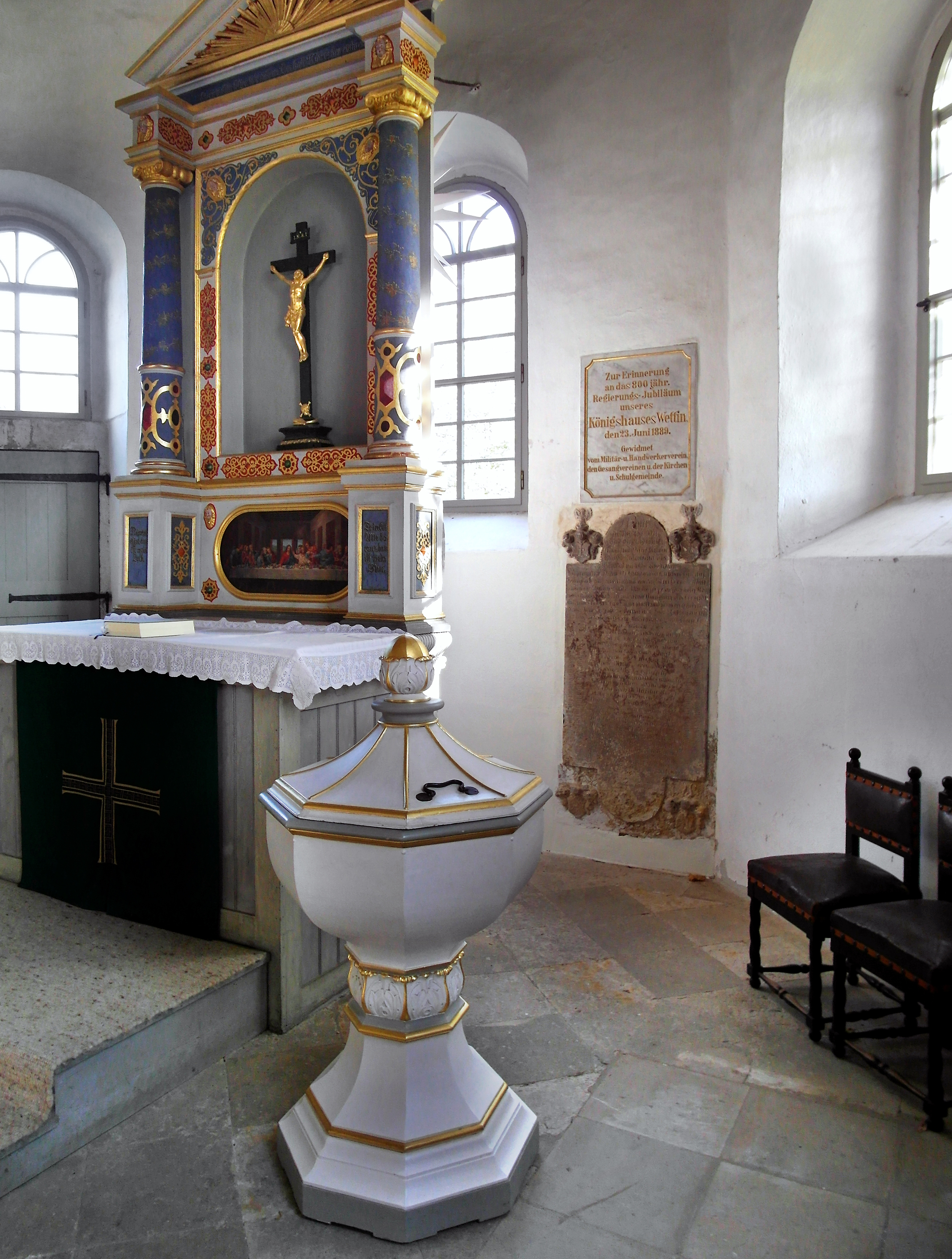 30.10.2018 01833 Dittersbach (Dürrröhrsdorf-Dittersbach), Hauptstraße 111: Evangelische Kirche (GMP: 51.036563,13.988027), errichtet nach dem Brand von 1660, Wiedereinweihung 1662. Hölzerne Taufe, 1859 vom Dresdner Tischler C. Creutz gefertigt. [SAM8485.JPG]20181030340DR.JPG(c)Blobelt